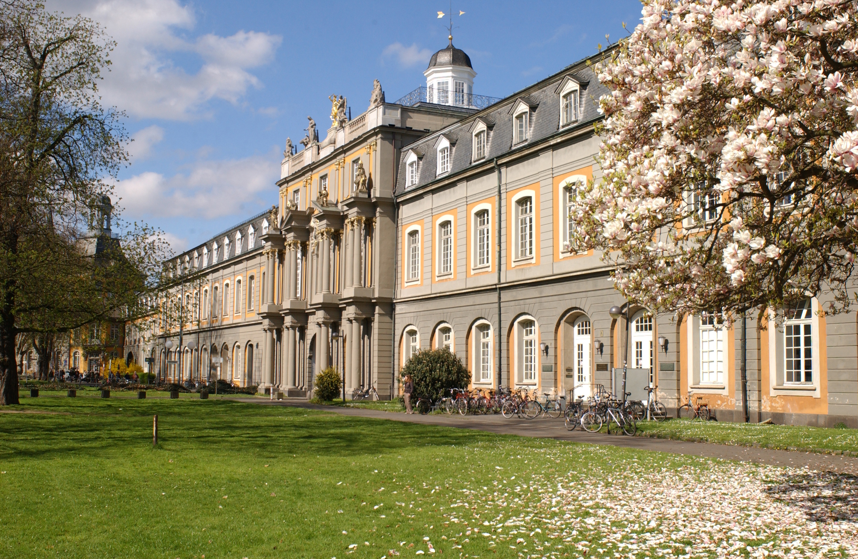 Vue de l'Université de Bonn.